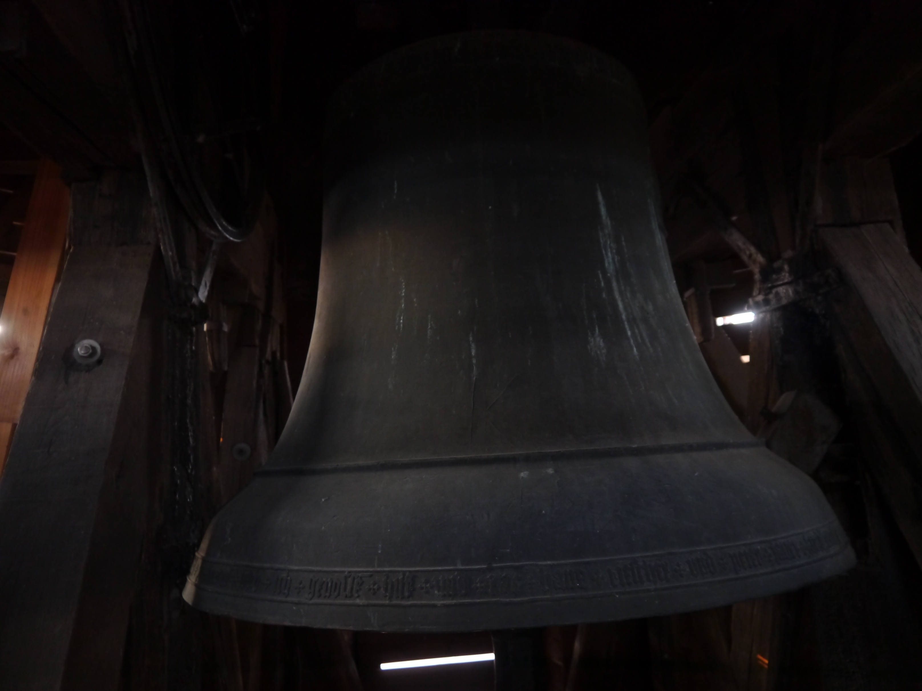 St. Gallus Ladenburg (Südturm) – Gallusglocke (1502) Ø 1420 mm, 1900 kg, es'